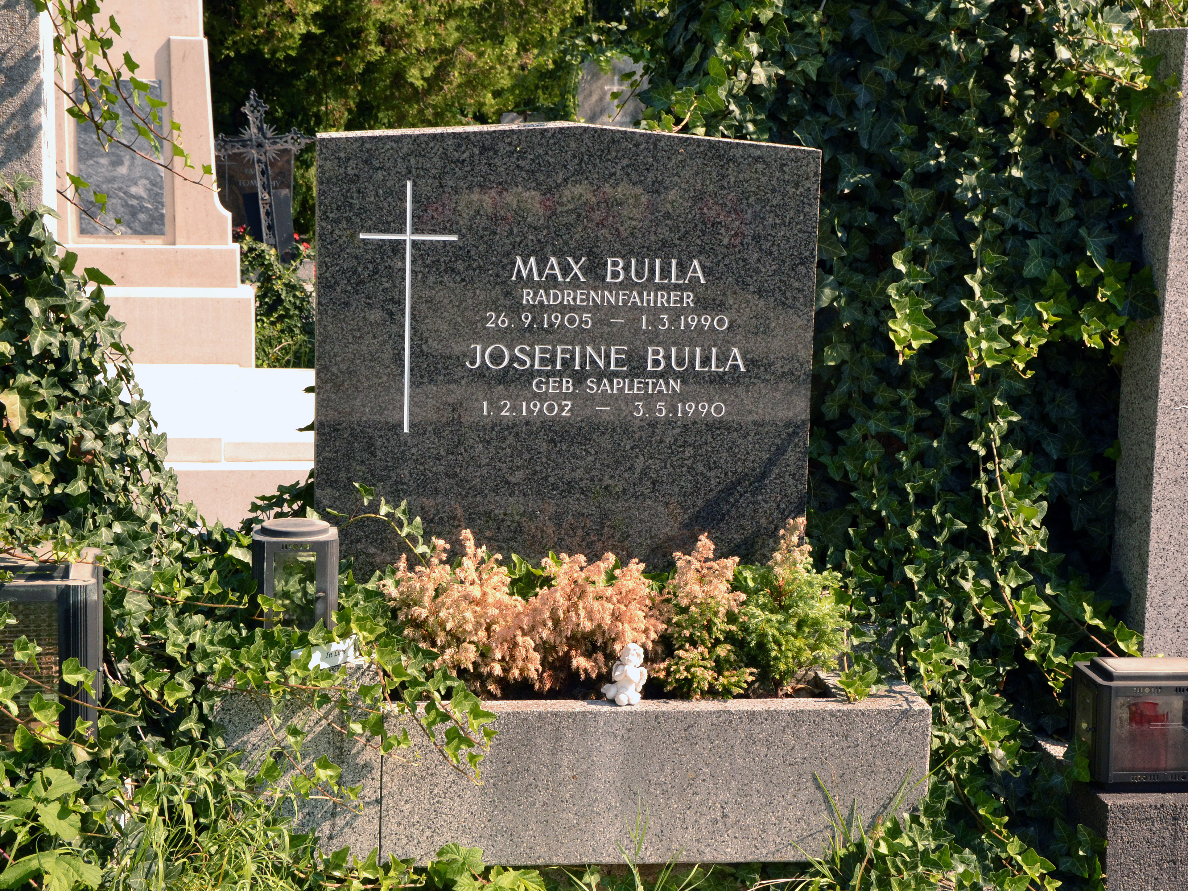 Cemetery Hinterbrühl Grave Max Bulla